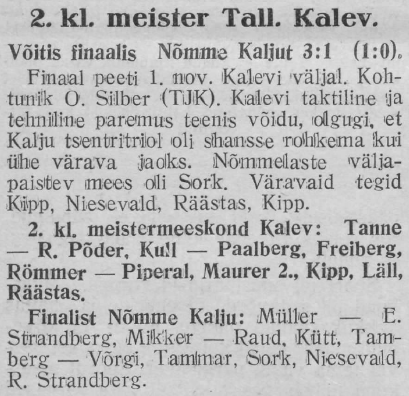 2. klassi meister